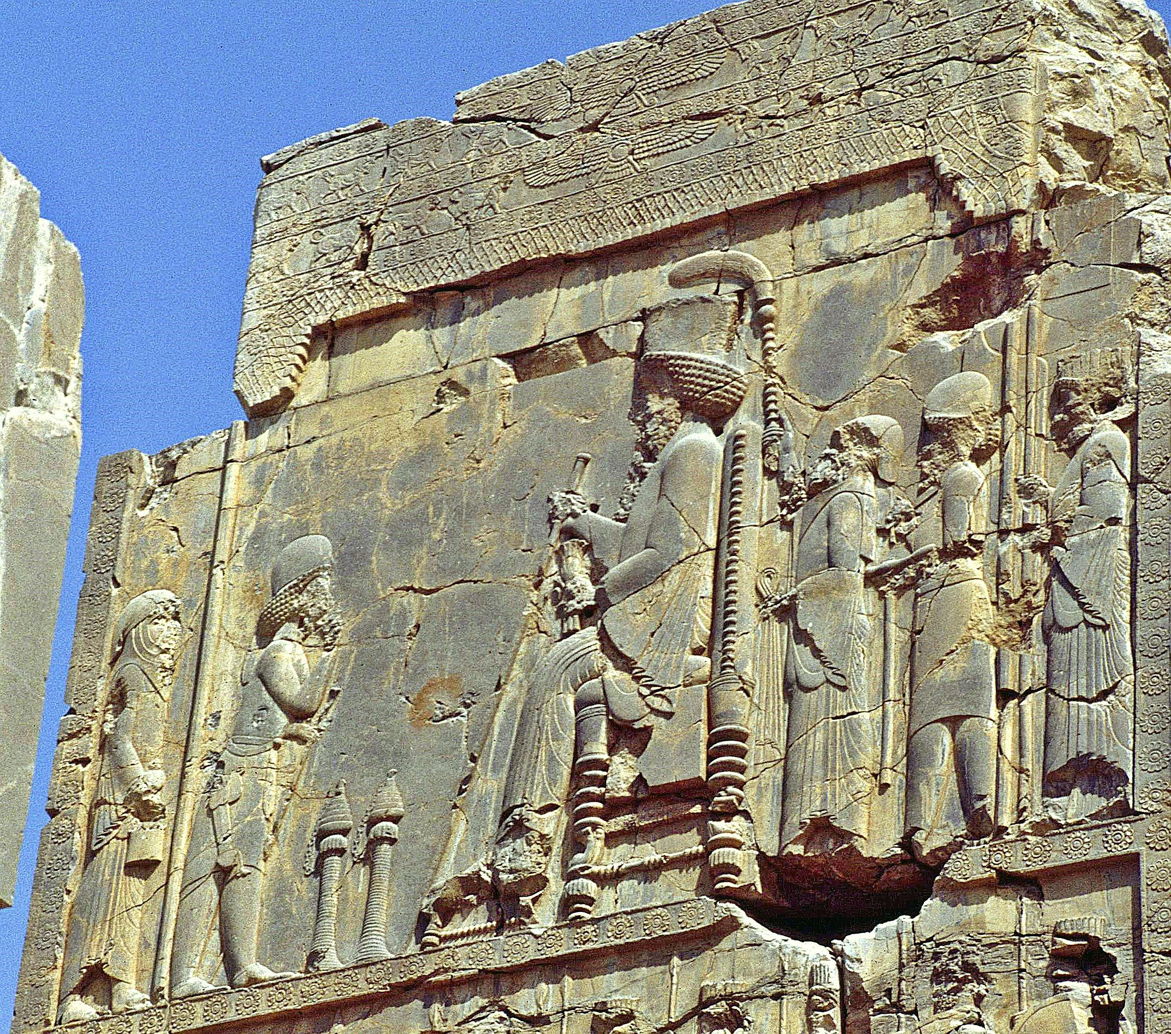 Persepolis: Halle der hundert Säulen